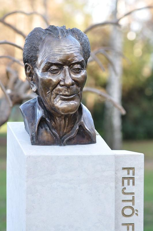 Fejtő Ferenc szobra a budapesti Szent István parkban. Kocsis András Sándor alkotása